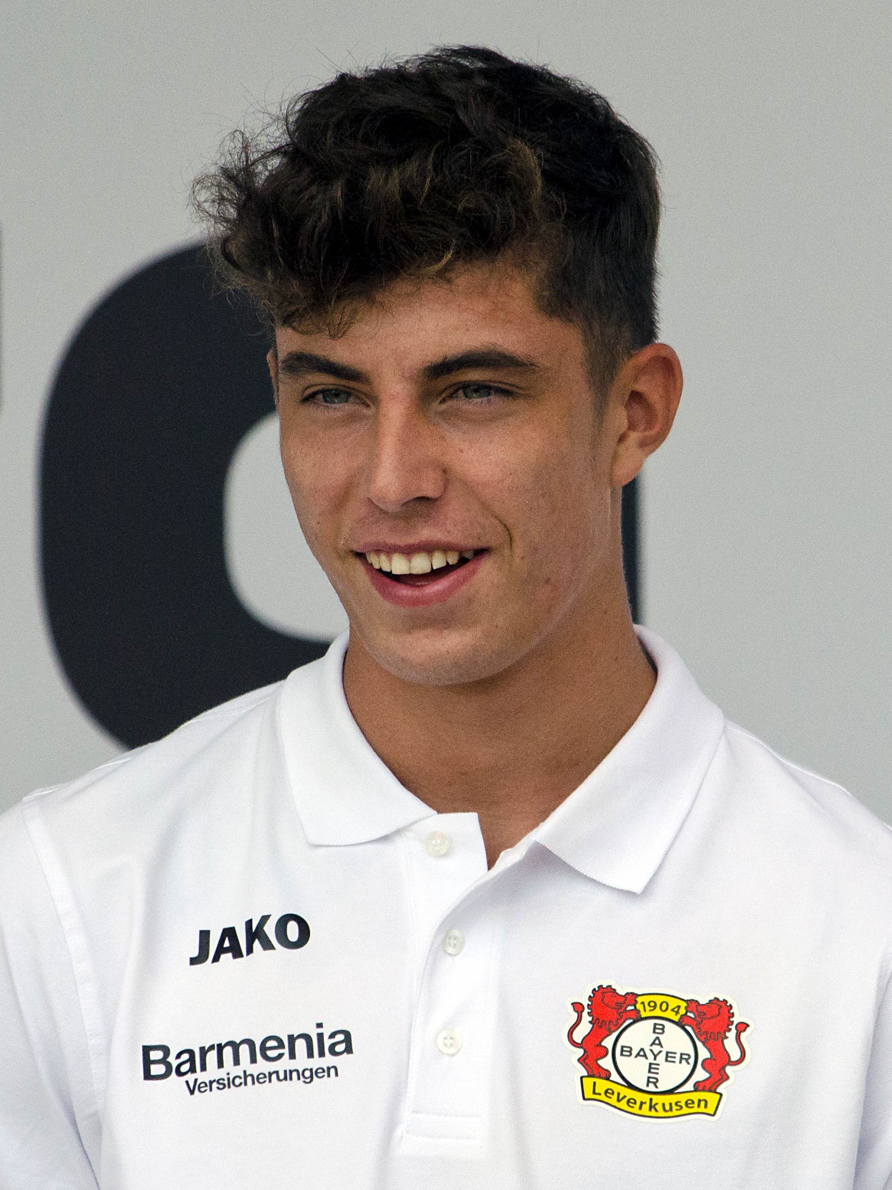 Kai Havertz, deutscher Fußballspieler